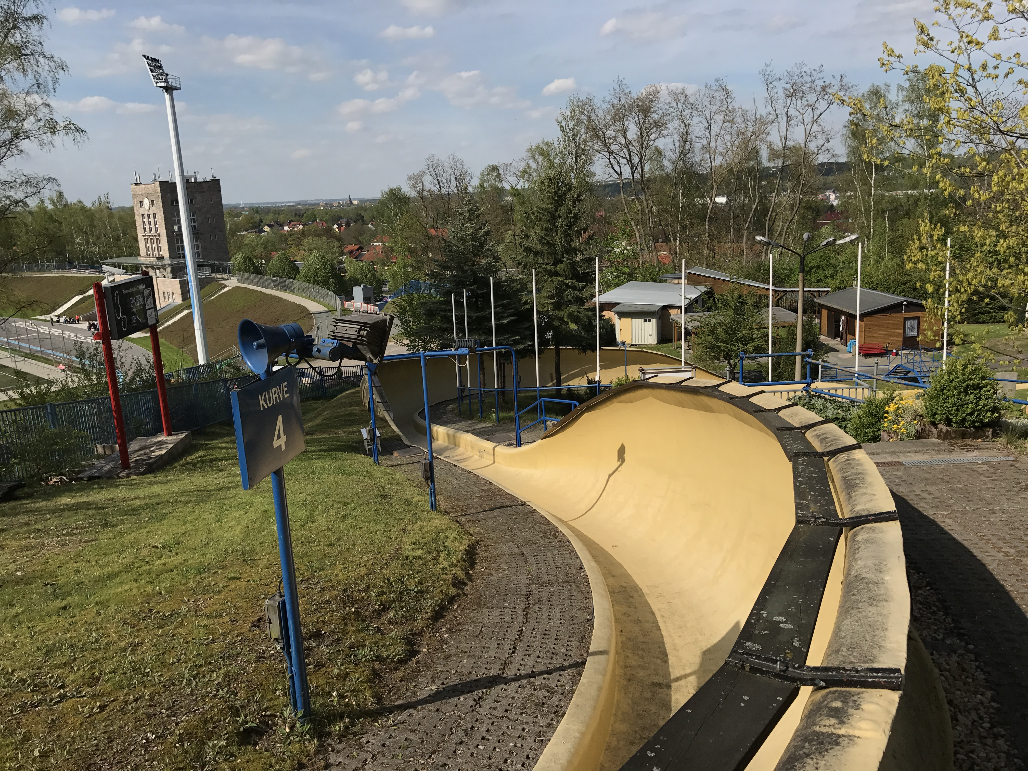 Der Blick von der Kurve 4 auf das Gelände des Westsachsenstadions